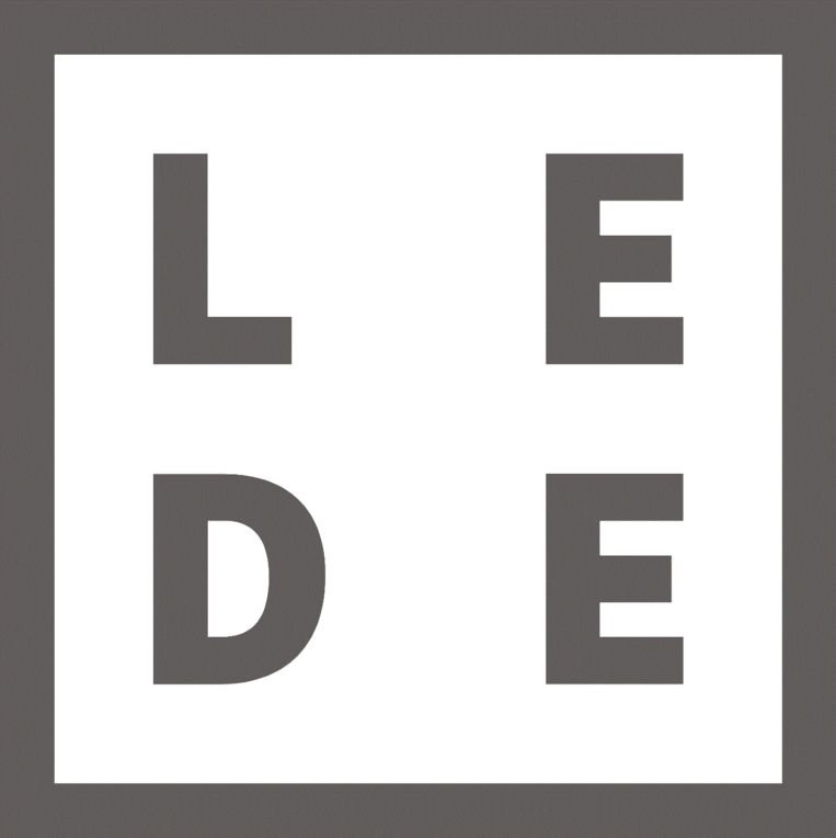 Nieuwe logo gemeente Lede sinds oktober 2019